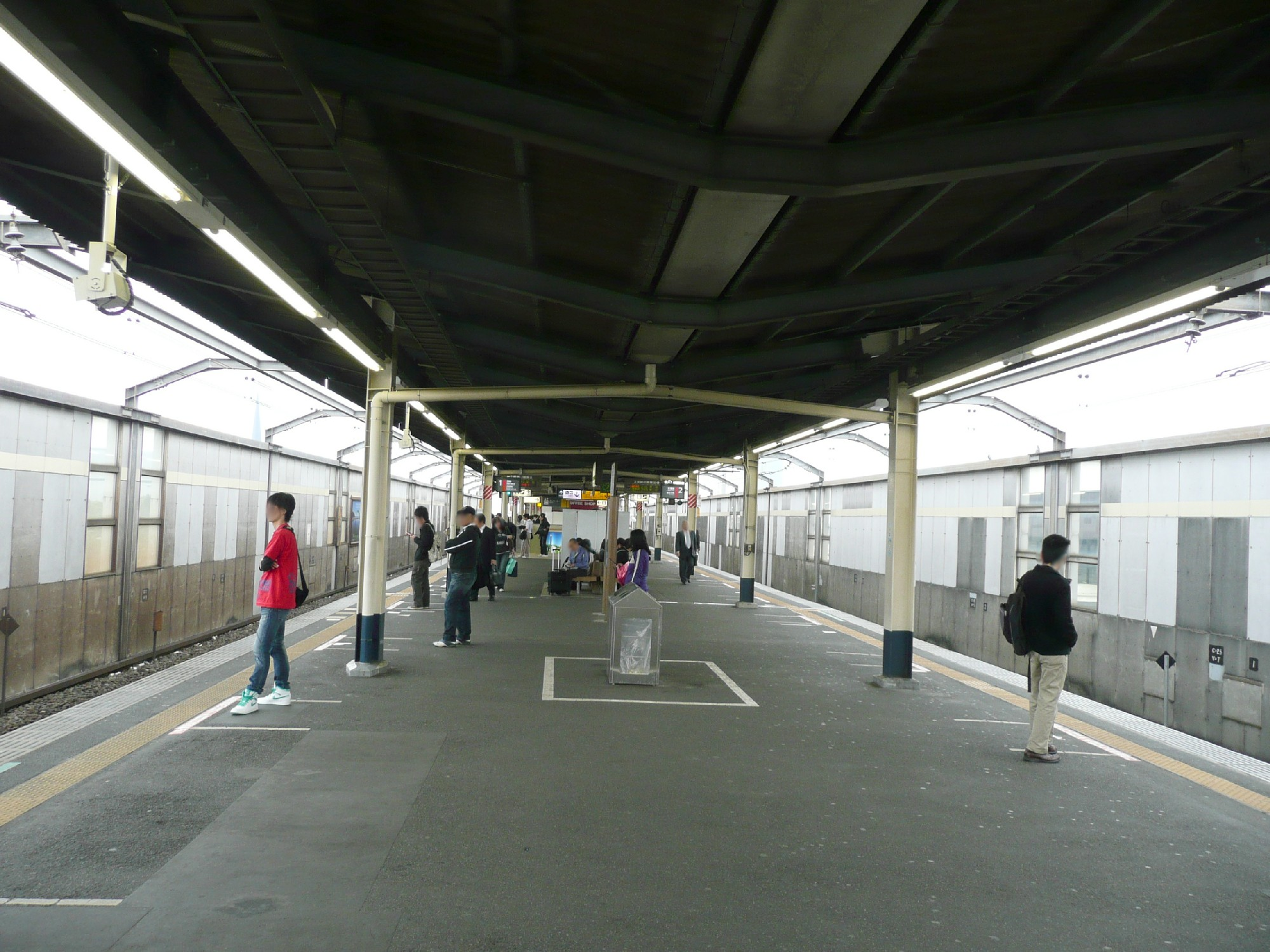 新木場駅JRホーム